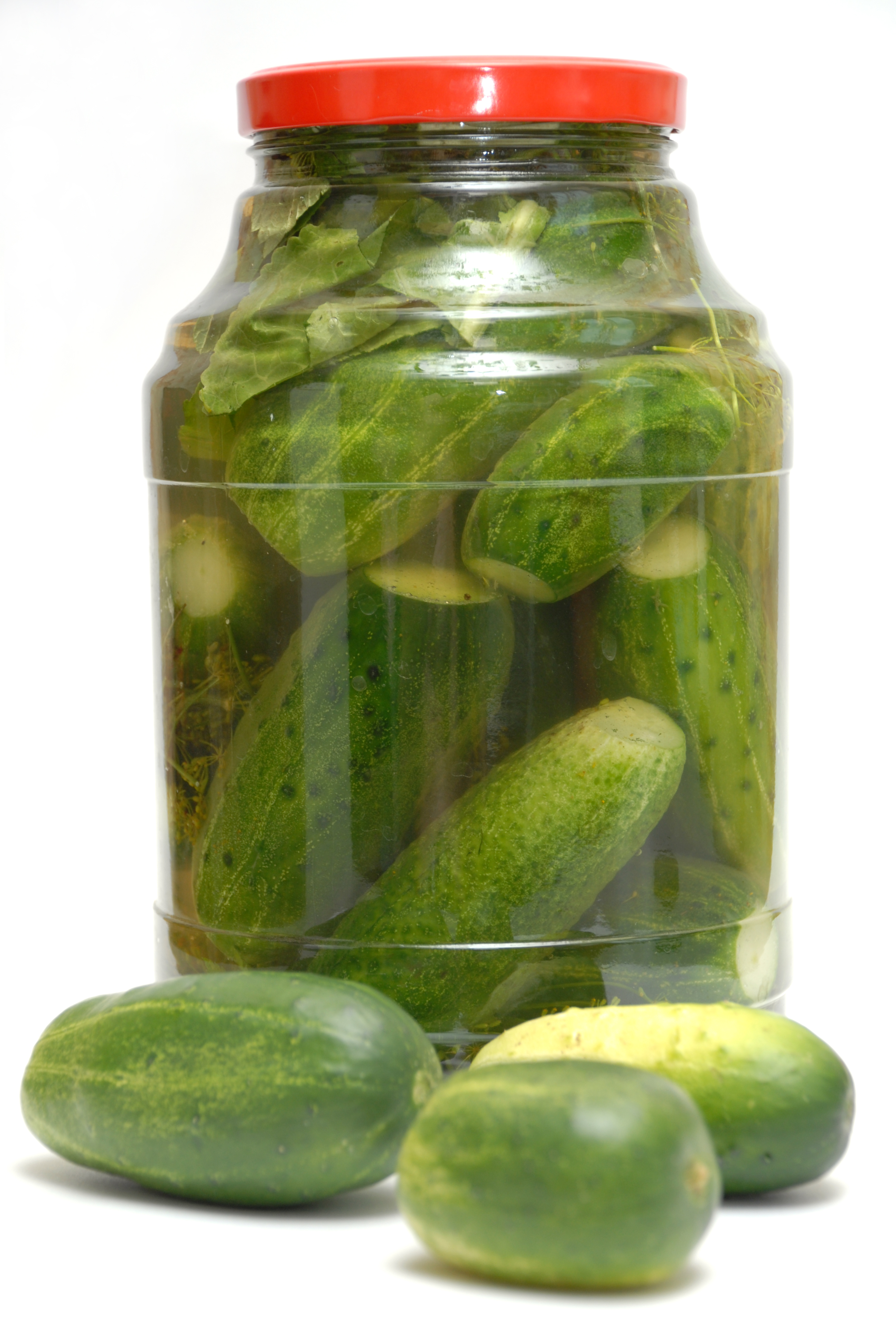 cucumber